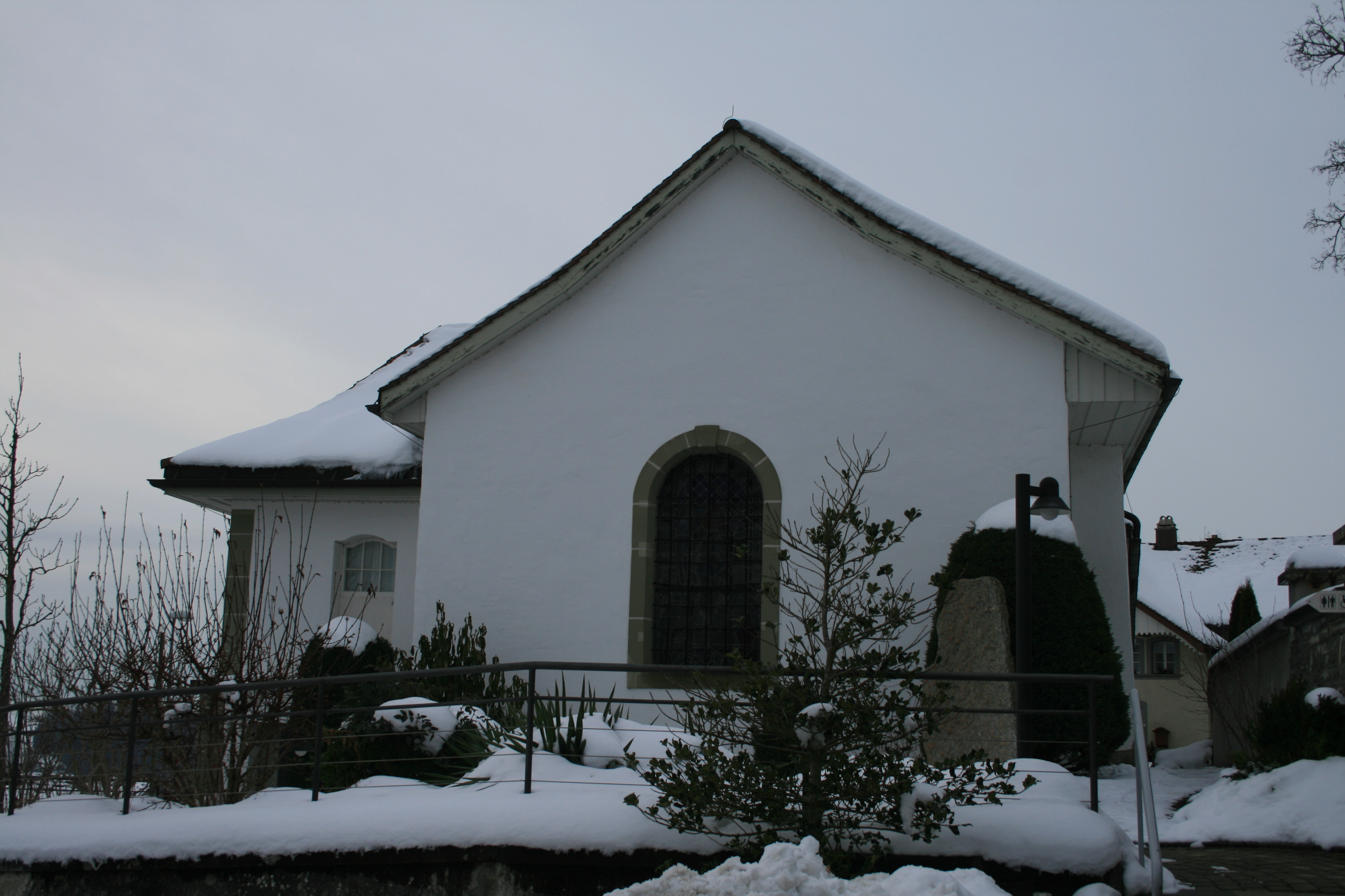 Alte St. Michael-Kirche (heute Vereinshaus), Heitenried